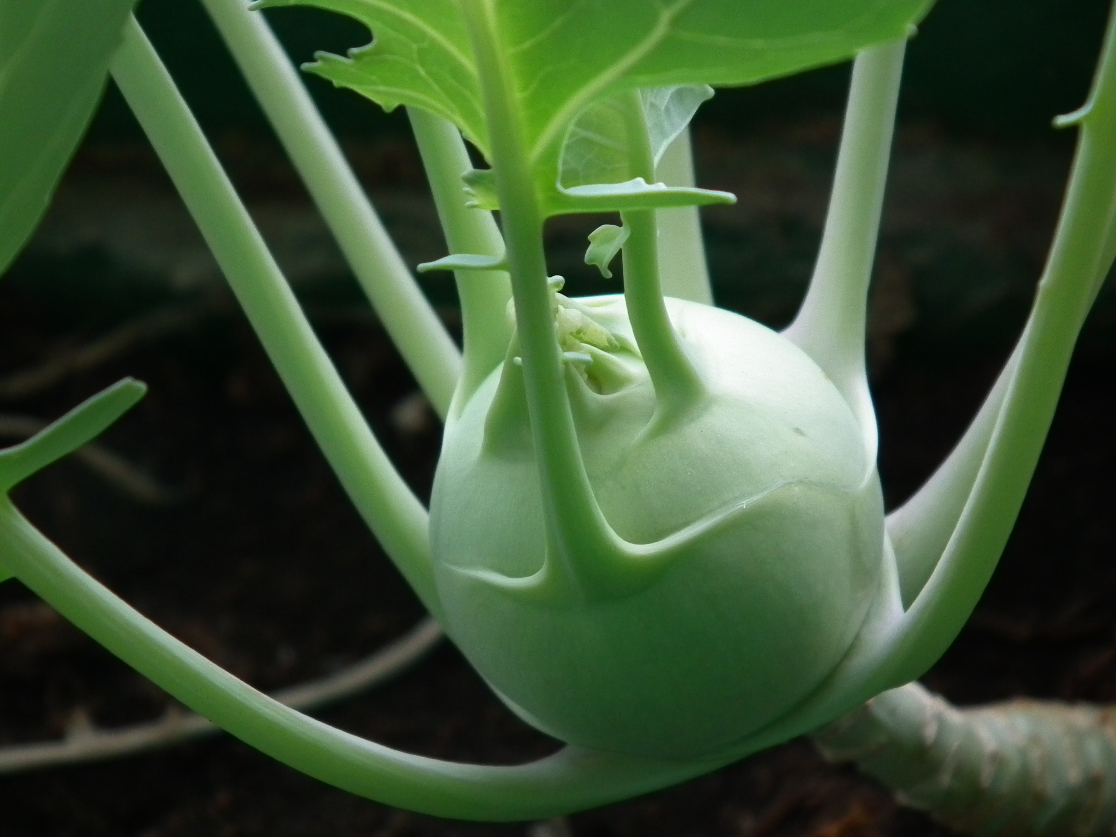 Kalarepa wyhodowana w Poznaniu.